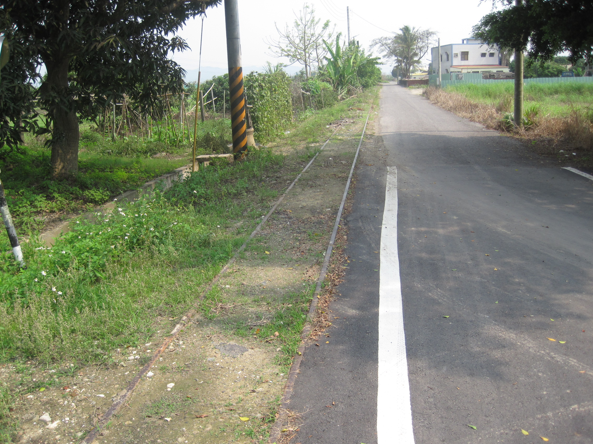 下寮子車站下寮旗站間的鐵軌